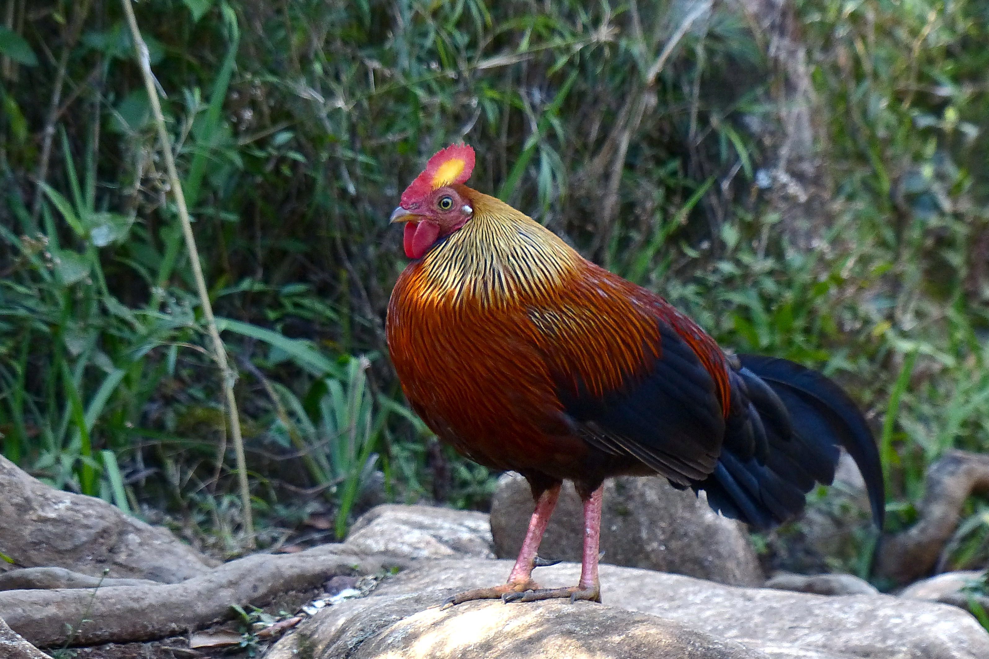 Wilder Hahn in Horton Plains, Sri Lanka